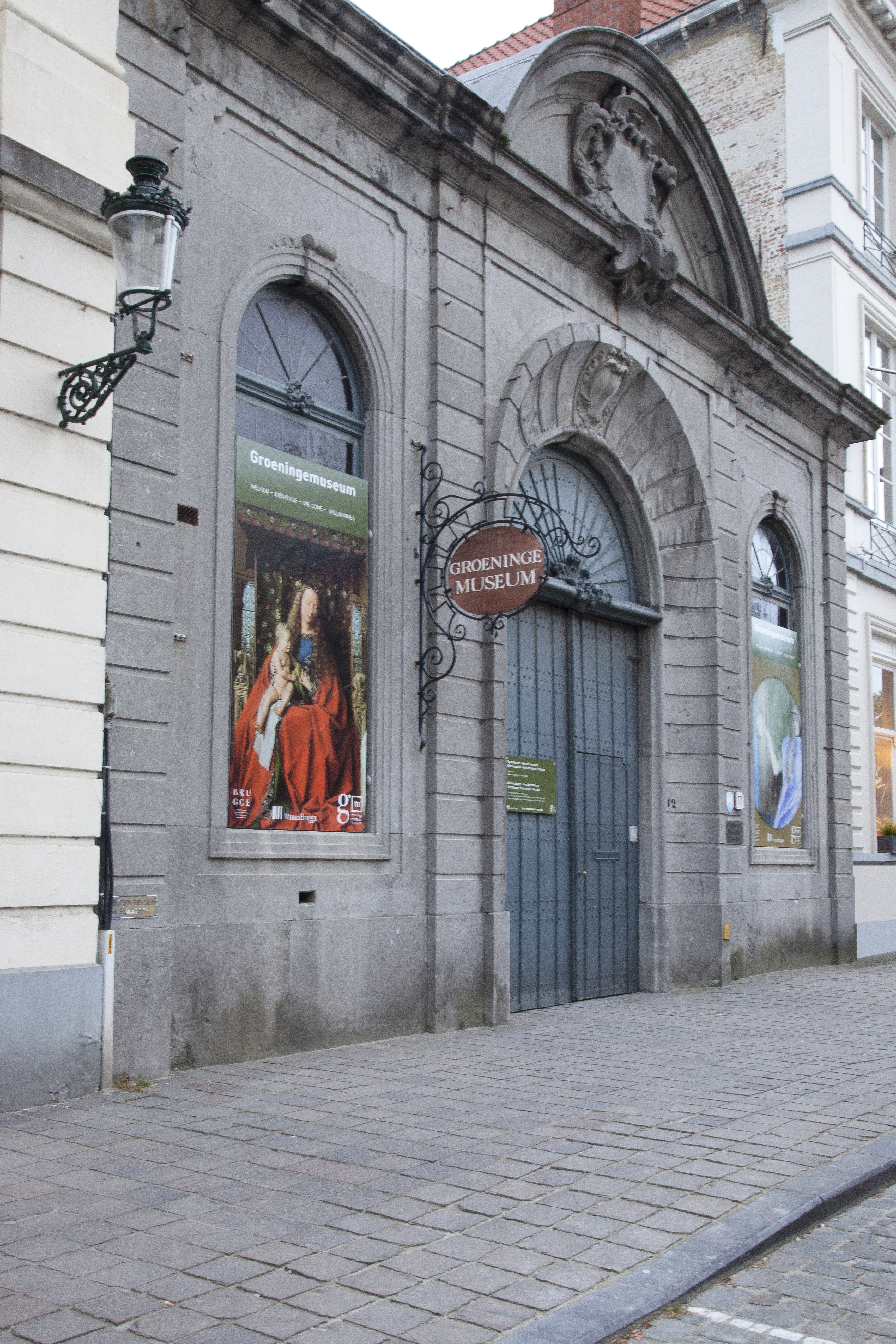 Brugge - Dijver 12 -Voormalig poortgebouw van de proosdij van Onze-Lieve-Vrouw,heden ingang van het Groeningemuseum - 82339